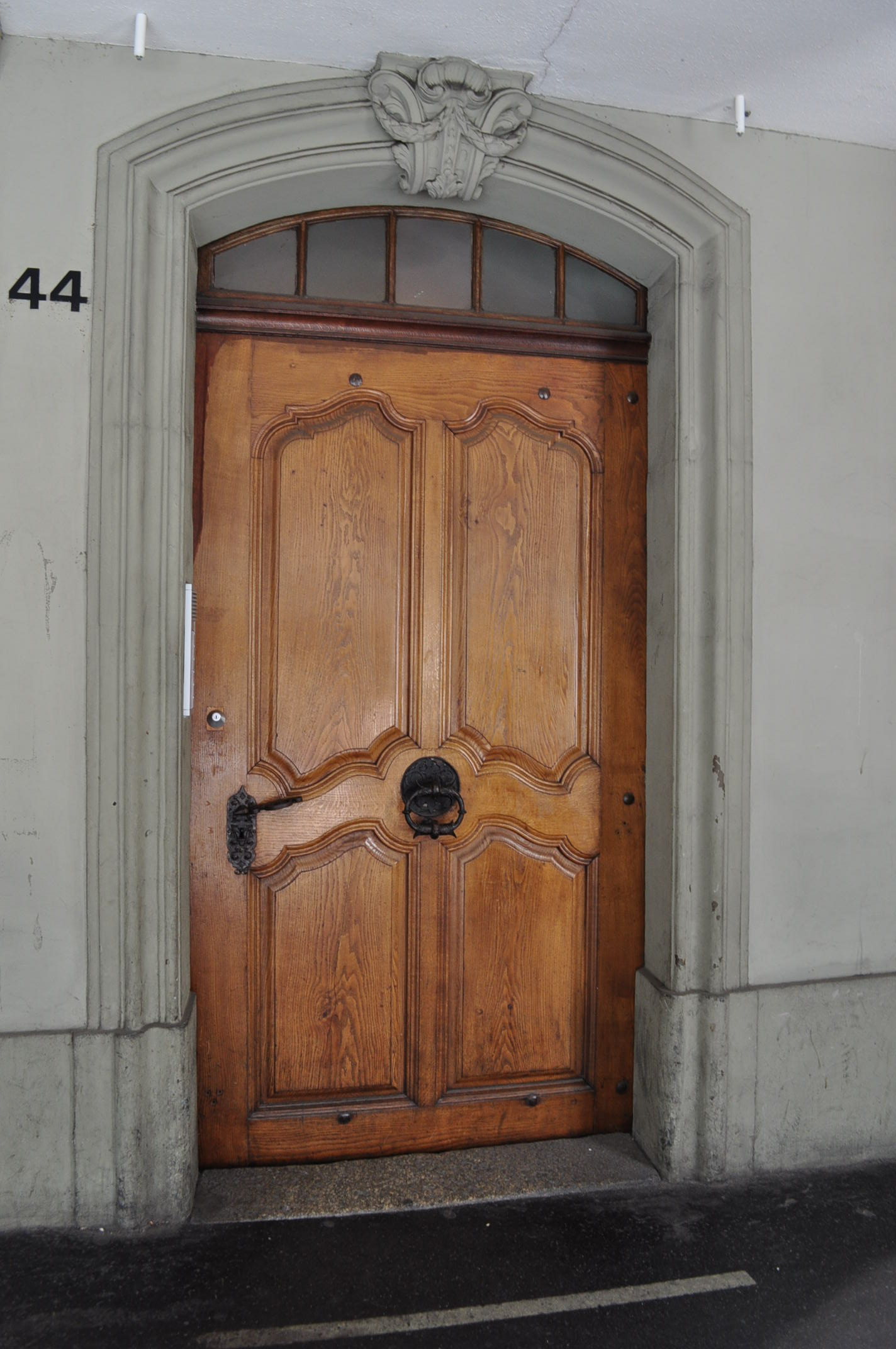 Türe der Gerechtigkeitsgasse 44, Berner Altstadt